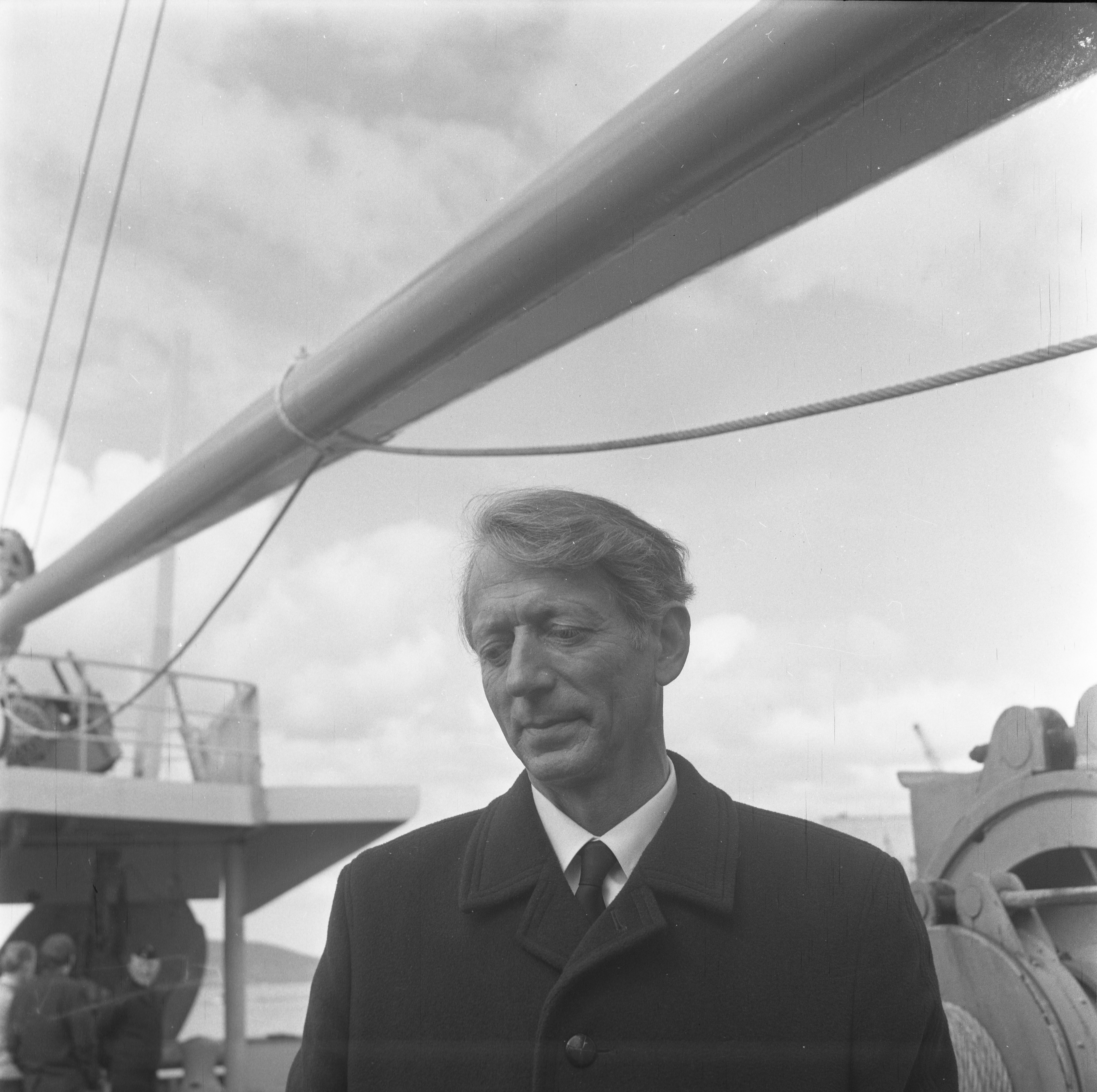 Format: Negativ 120 film Dato / Date: 25 April 1970 Fotograf / Photographer: Eirik Sundvor (1902 - 1992) Sted / Place: Bergen Wikipedia: Gunnar Sætersdal (1922 - 1997) Wikipedia: Havforskningsinstituttet Eier / Owner Institution: Trondheim byarkiv, The Municipal Archives of Trondheim Arkivreferanse / Archive reference: Tor.H43.Bxx.F14425 Merknad: Under andre verdenskrig medlem av Kompani Linge, begynte å studere marinbiologi ved Universitetet i Oslo etter krigen (hovedoppgave 1952). Jobbet med fiskerispørsmål som FN-ekspert i Peru 1961 og senere Chile; var i Sør-Amerika til 1967 da han ble forflyttet til Roma. Direktør av Havforskningsinstituttet 1972 - 1986. Professor II ved Universitetet i Bergen 1972 - 1992.